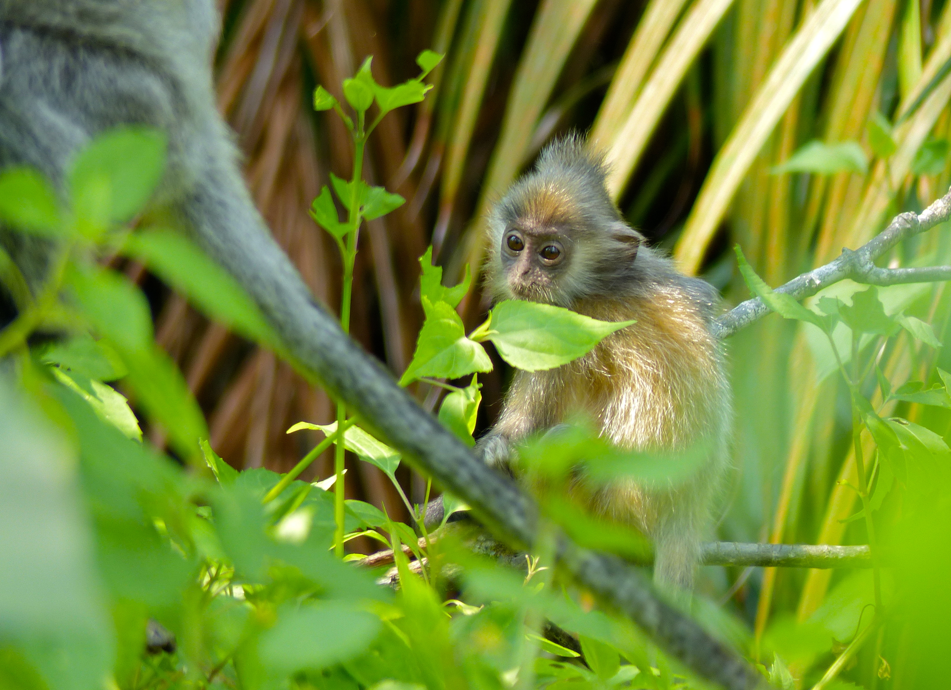 Lintang Trail, Bako NP, Sarawak, MALAYSIA